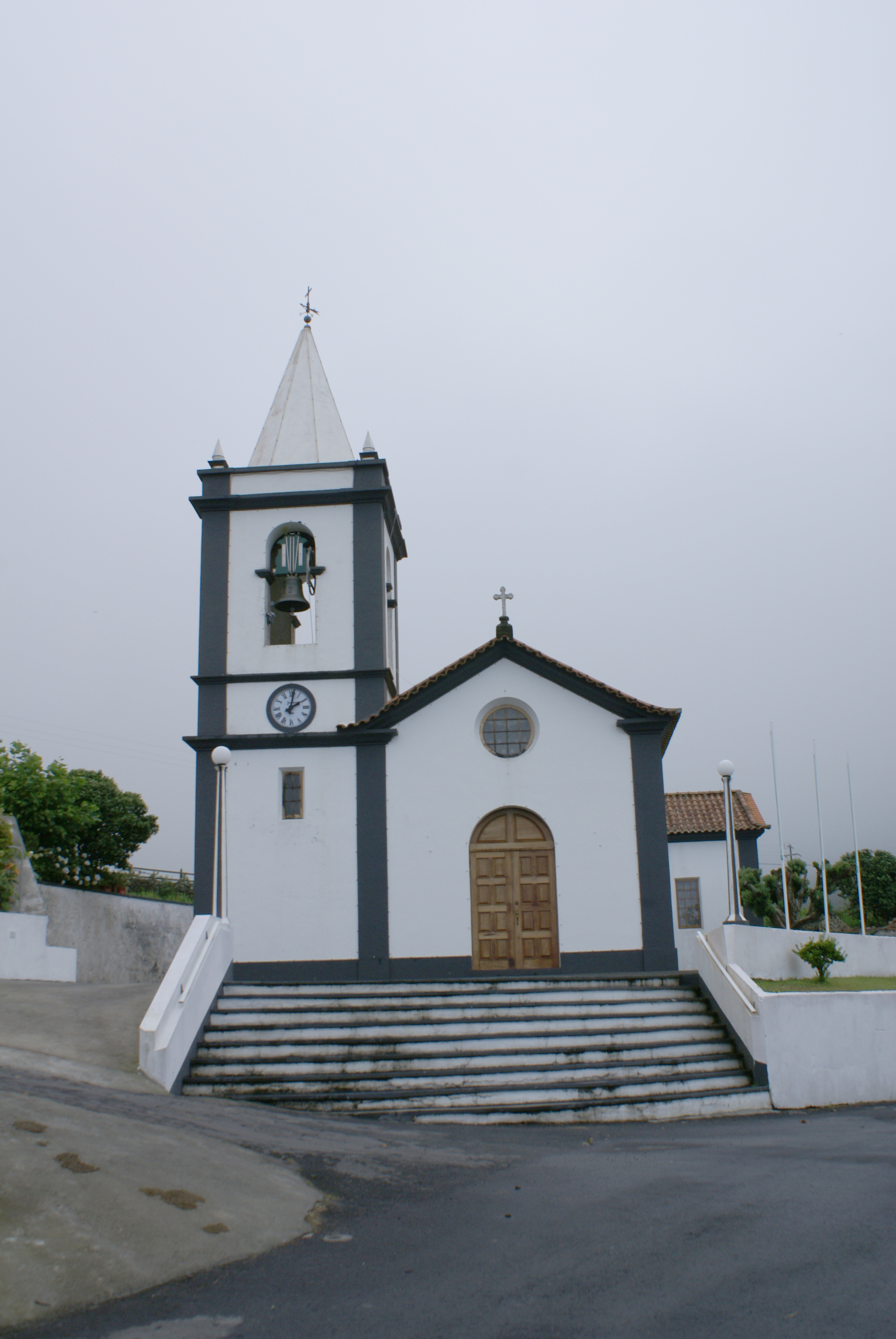 Igreja de Santa Ana, Beira, Velas, Ilha de São Jorge